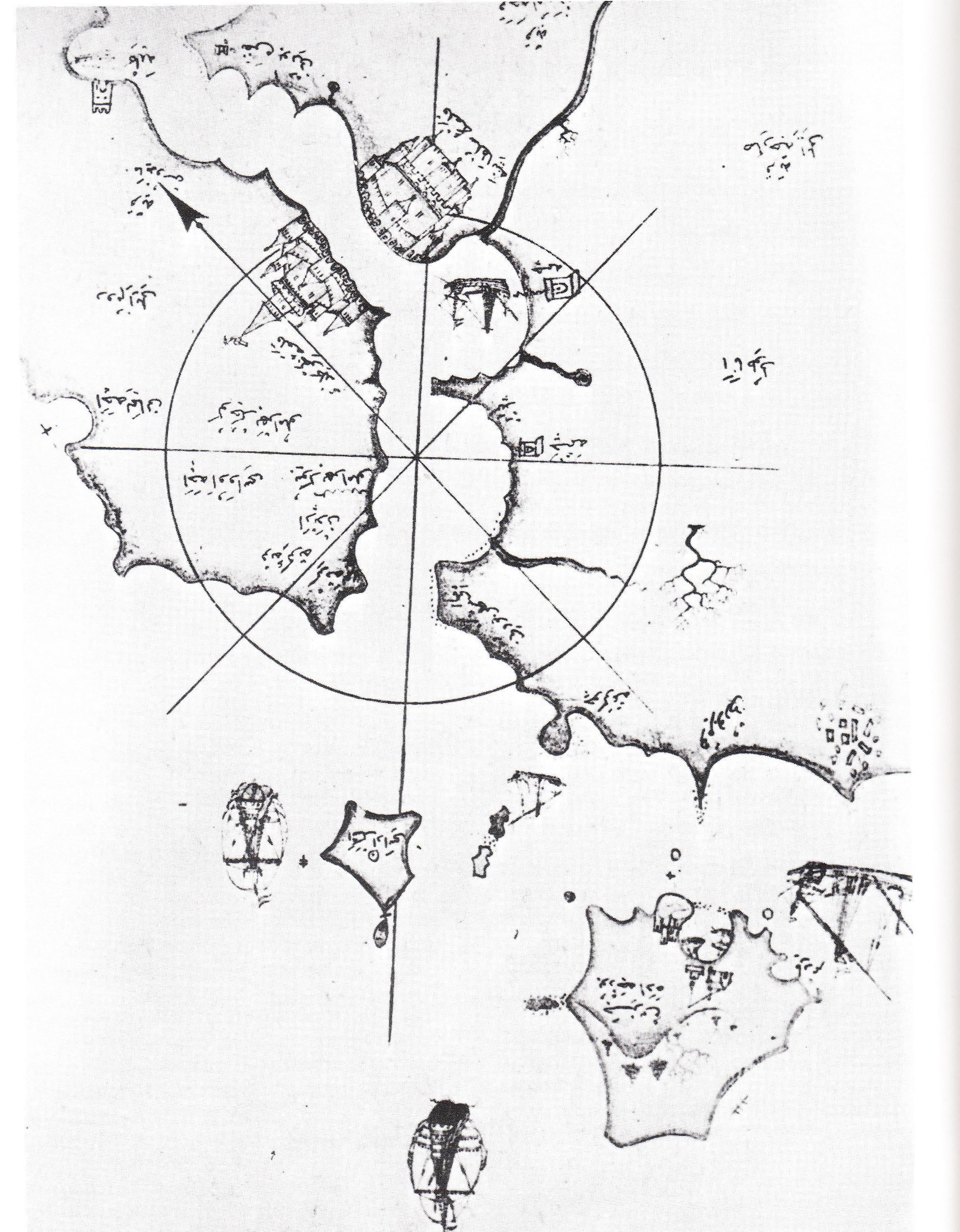 Dardanelles for Piri Reis